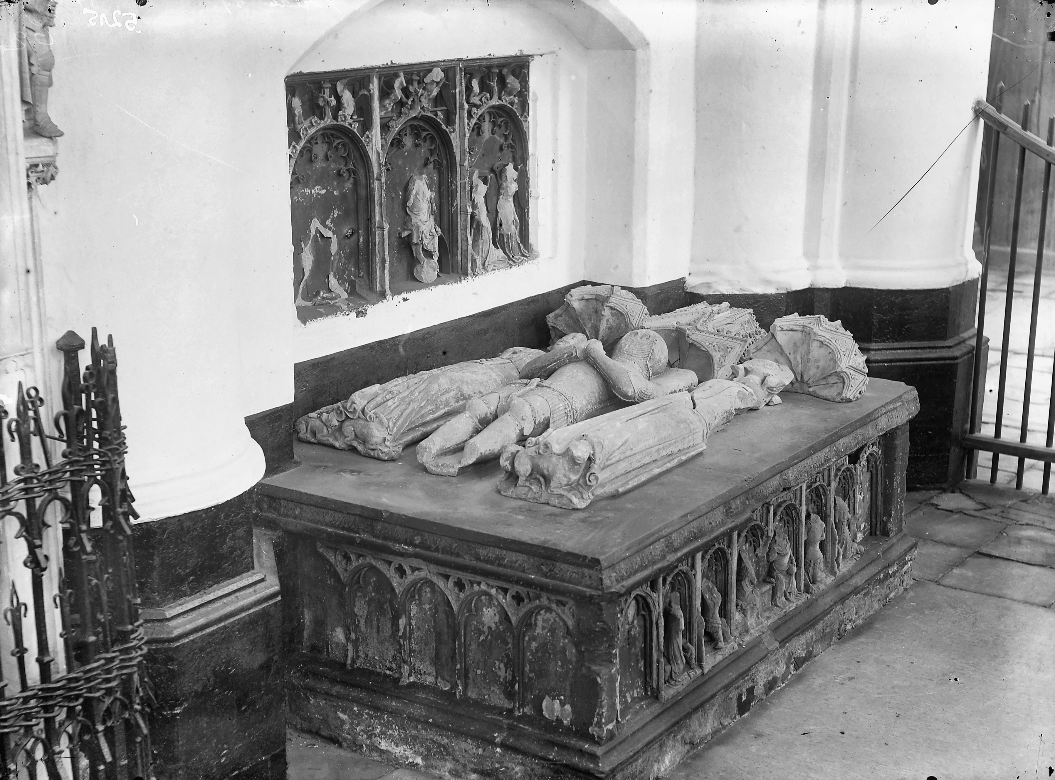 Grote Kerk Grafmonument en Zerken: grafmonument van J. van Polanen met zijn 2 echtgenoten Olda van Hoorn en Machteld van Rotselaar